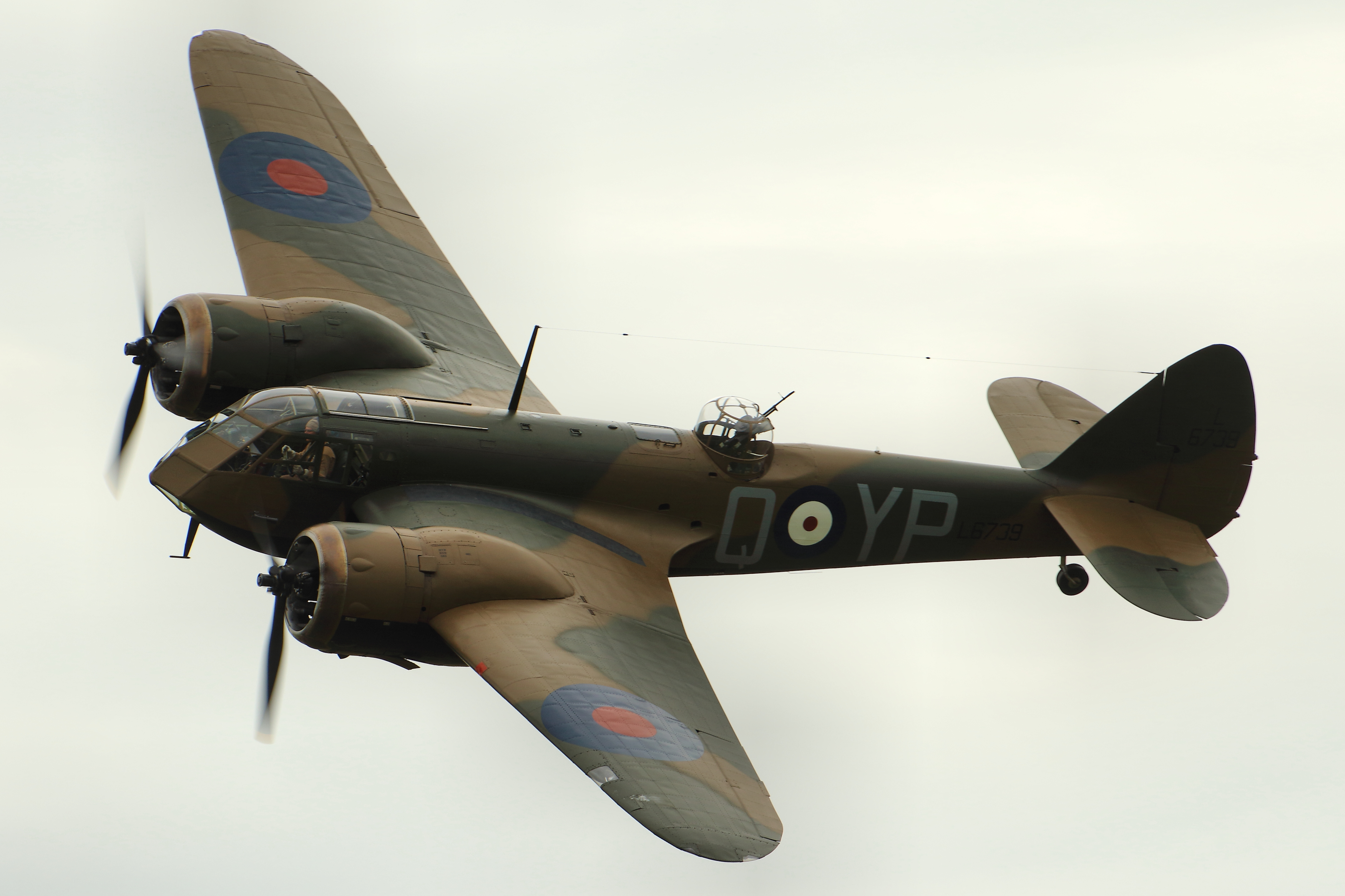 Blenheim - Duxford